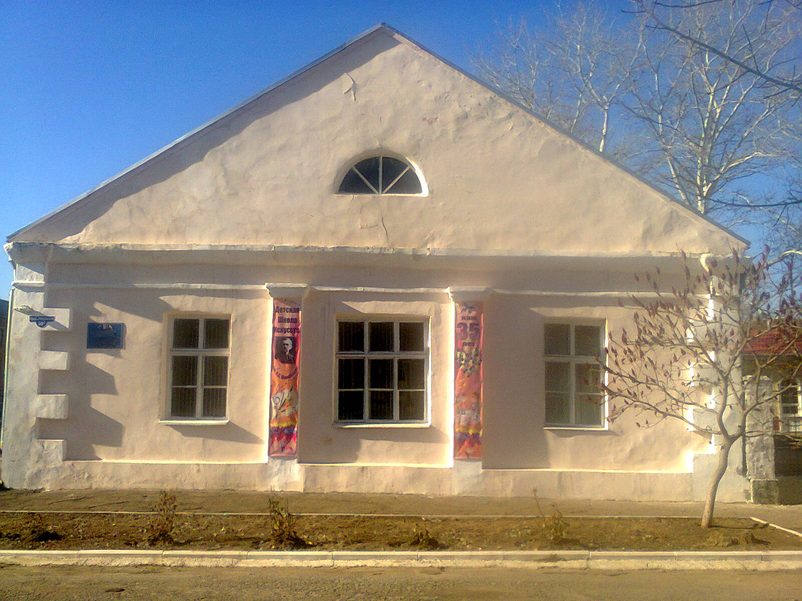 Школа искусств имени Минченкова в Каменске-Шахтинском